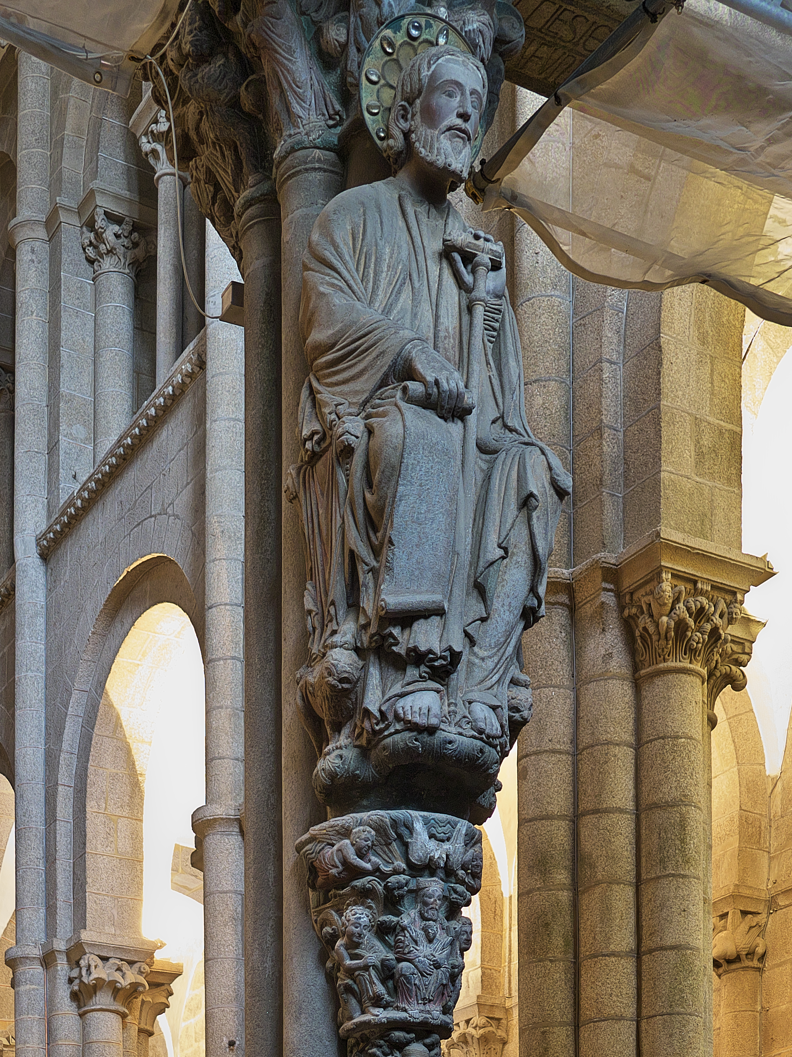 "De Jesé brotará un tallo, y una flor de su raiz" (Isaías 11,1) Impresiona la escenografía por los profundos conocimientos bíblicos del creador de la obra. Sobre el árbol de Jesé, el capitel con la Trinidad y, sobre ella, la figura del Apóstol, de expresión indefinible, que recibe a su peregrino.